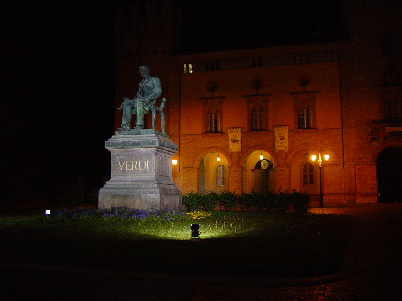 Verdi Memorial in Busseto